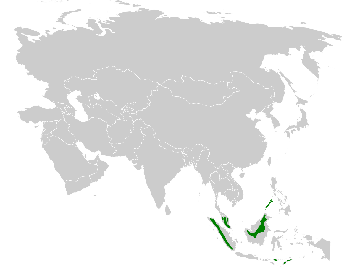 Seicercus montis distribution map, based on